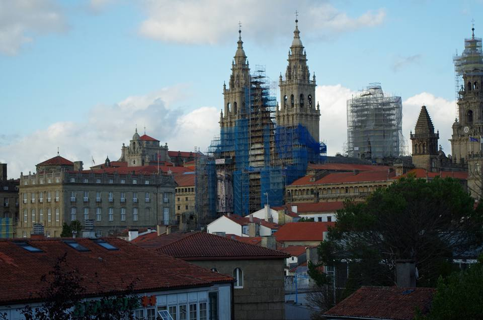 Catedral de Santiago de Compostela durante las reformas que sufrió en verano de 2017. Vista desde el Parque Alameda